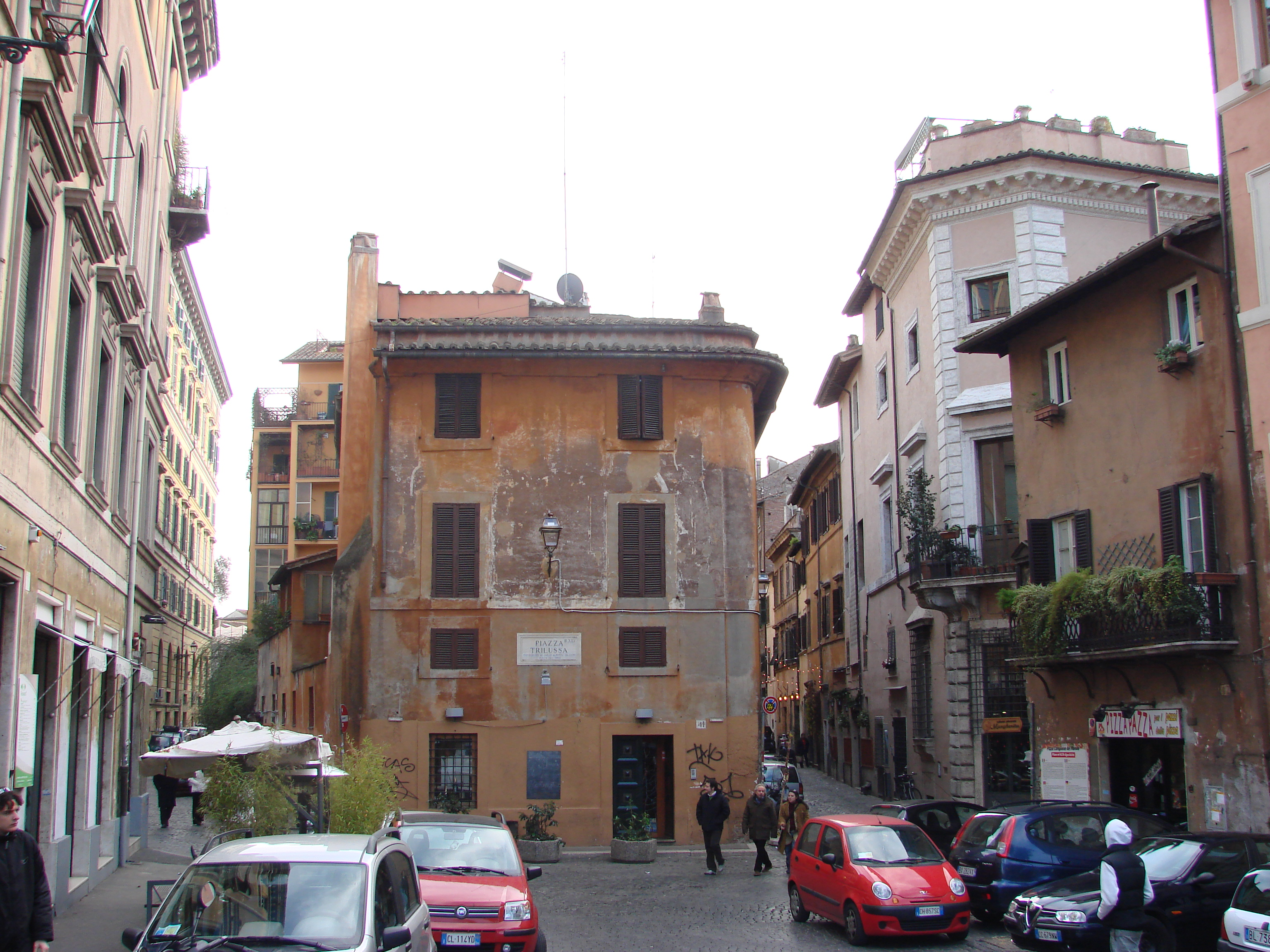 2006-12-17 12-22 Rom 506 Trastevere